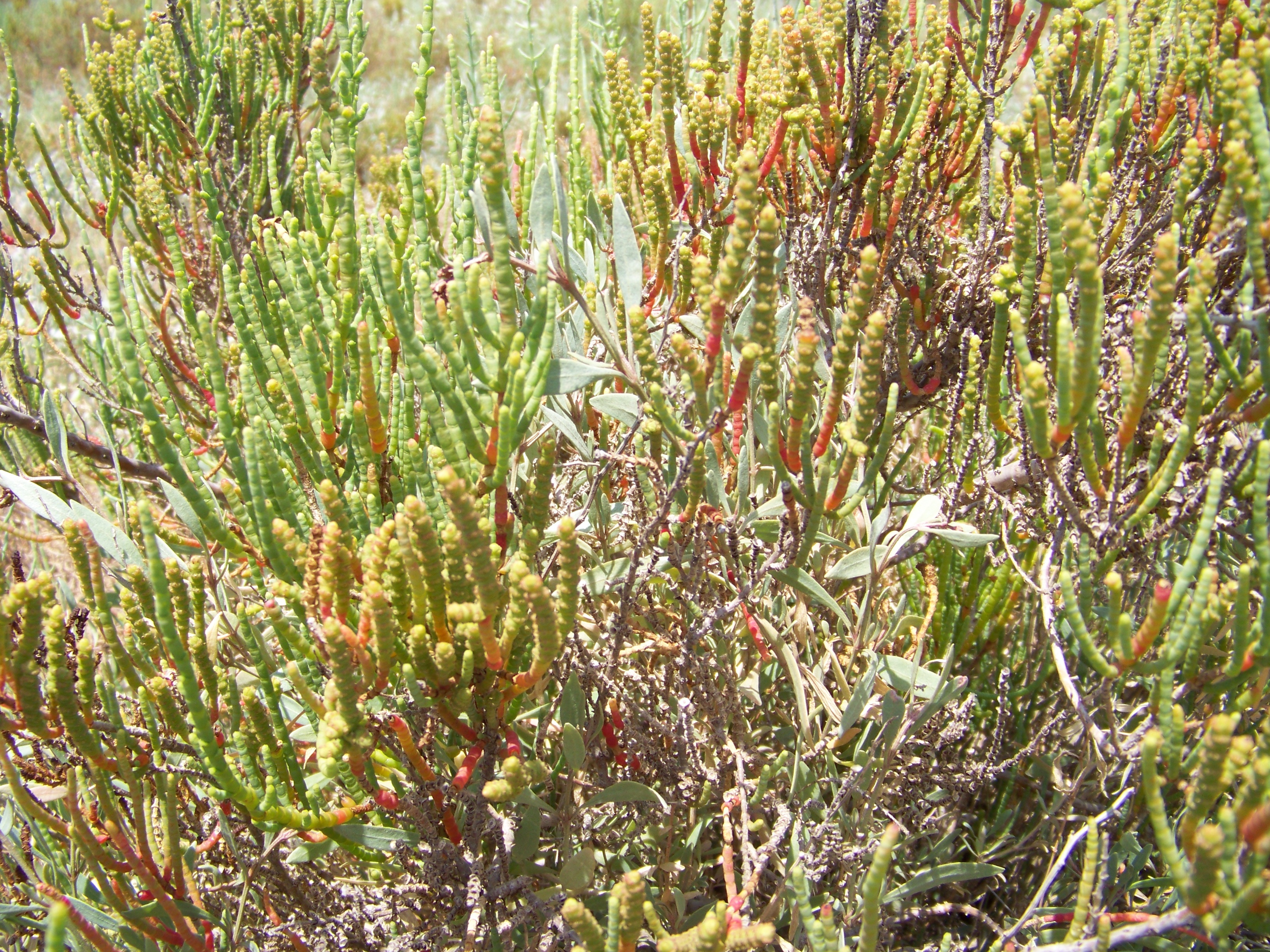 Vegetación halófita compuesta por especies de la familia Quenopodiaceae, de los géneros Sarcocornia y Atriplex This is a photography of a Special Area of Conservation in Spain with the ID: ES6120006. Natura2000 entry, EEA entry